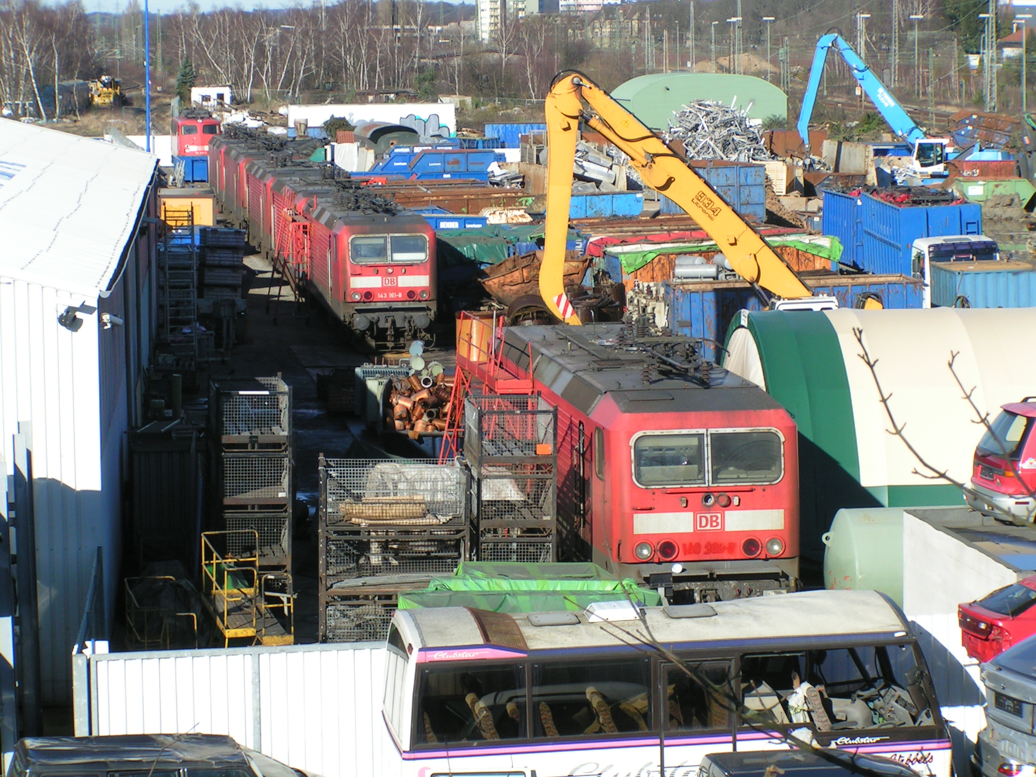 Verschrottung von Lokomotiven der Baureihe 143 der DB bei einem Schrotthändler in Leverkusen-Opladen.